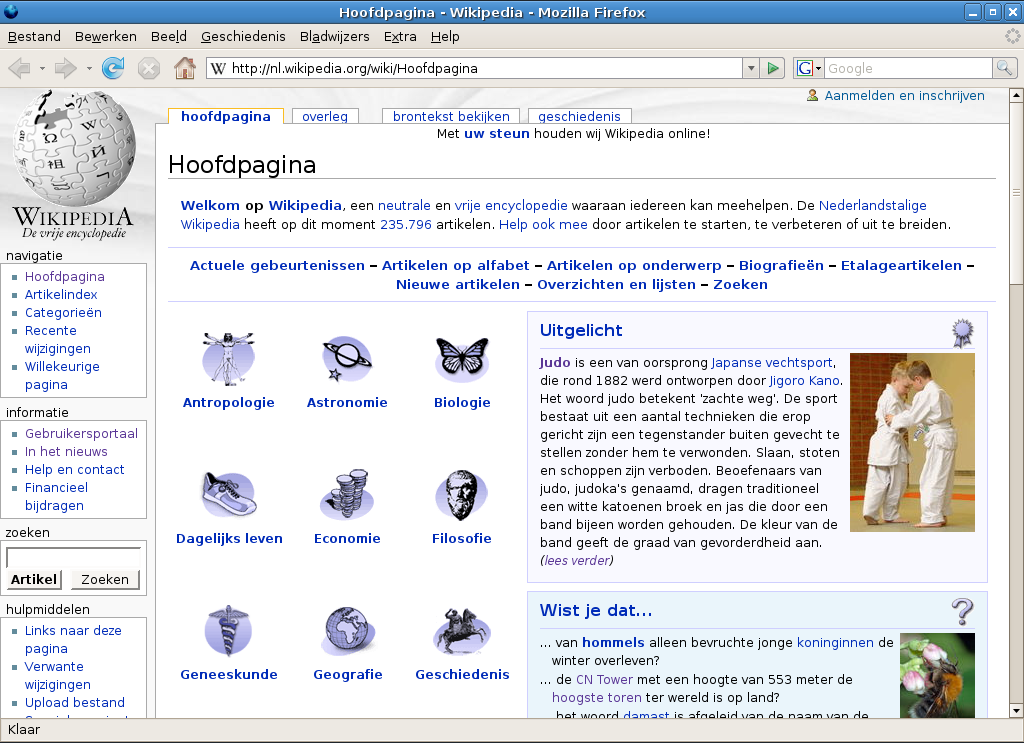 Screenshot van Mozilla Firefox, versie 2.0 op GNU/Linux met de hoofdpagina van de Nederlandstalige Wikipedia.